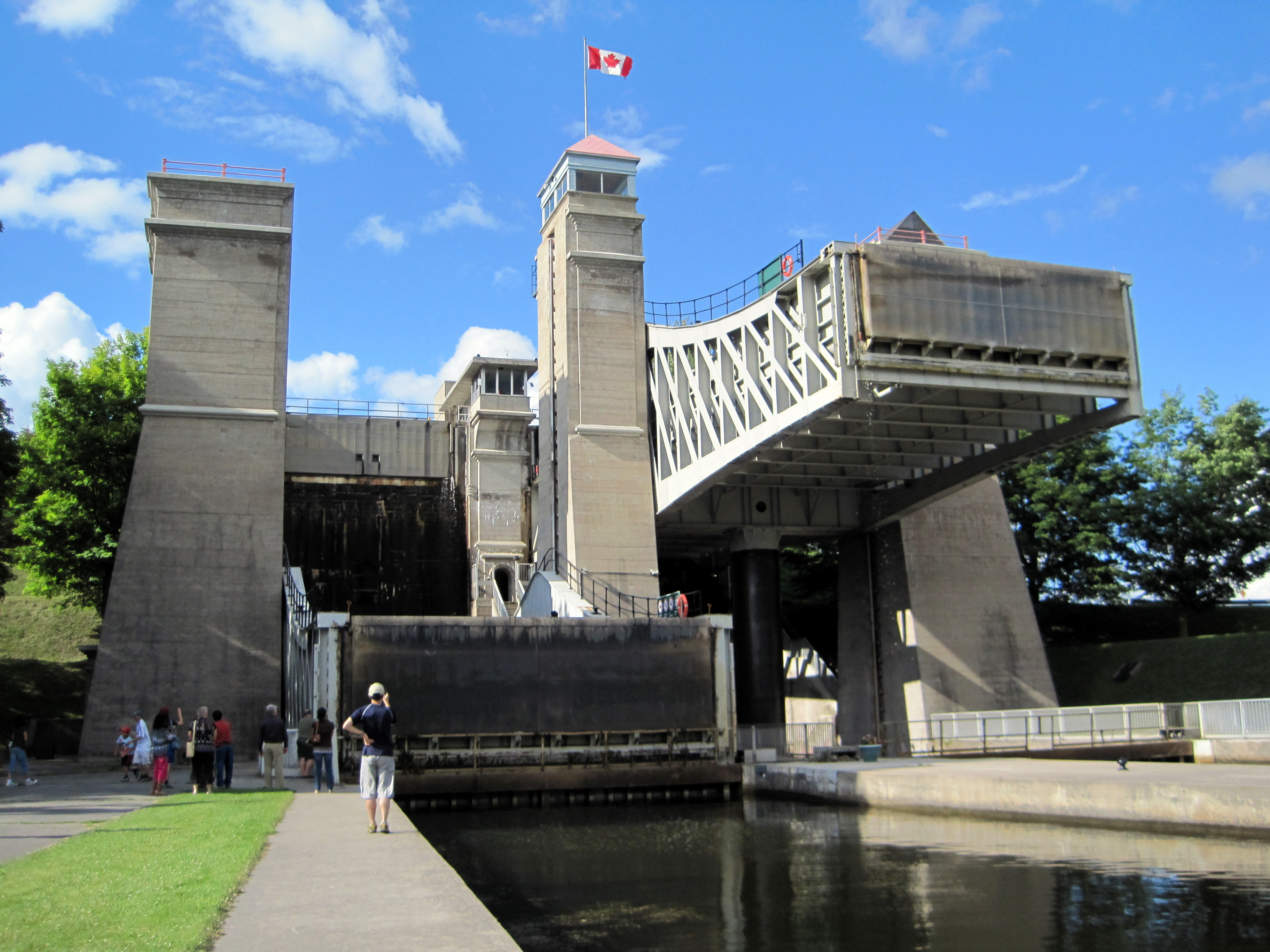 Lifting II